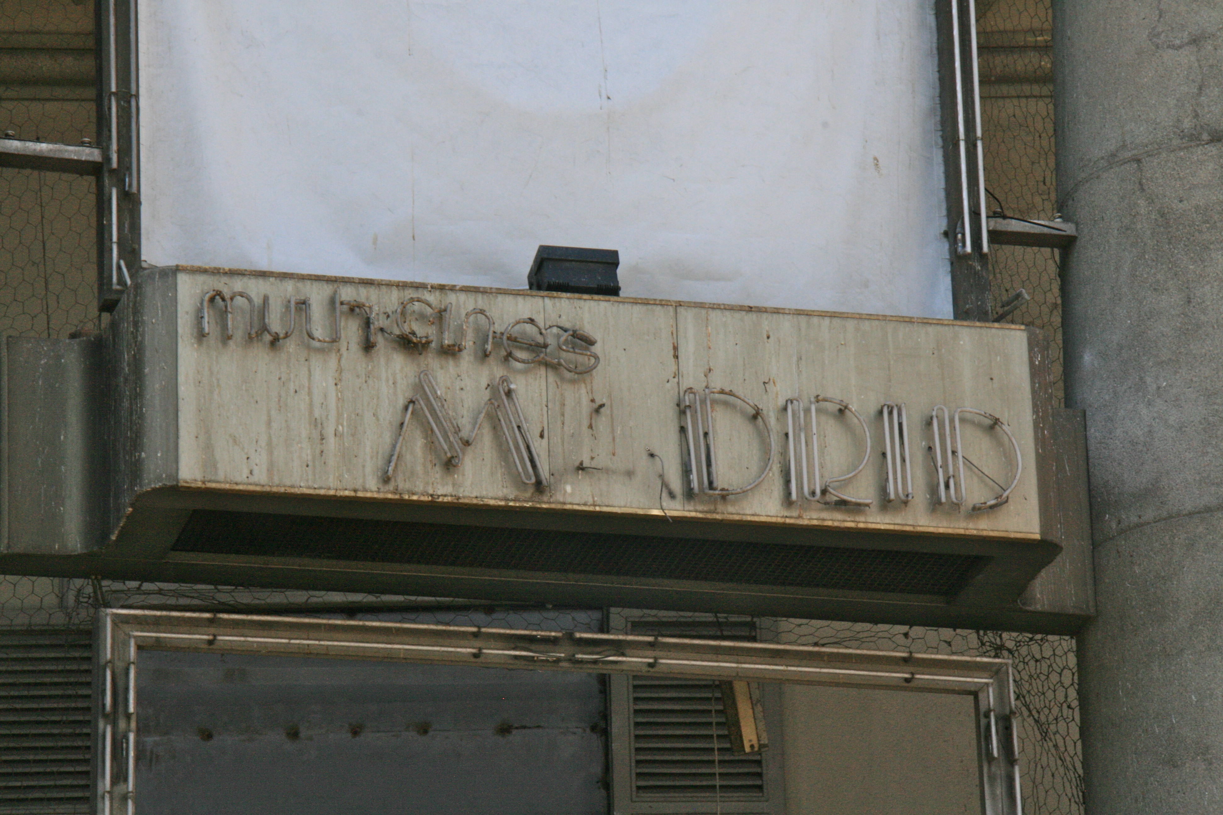 Multicines el Madrid - Plaza de Carmen